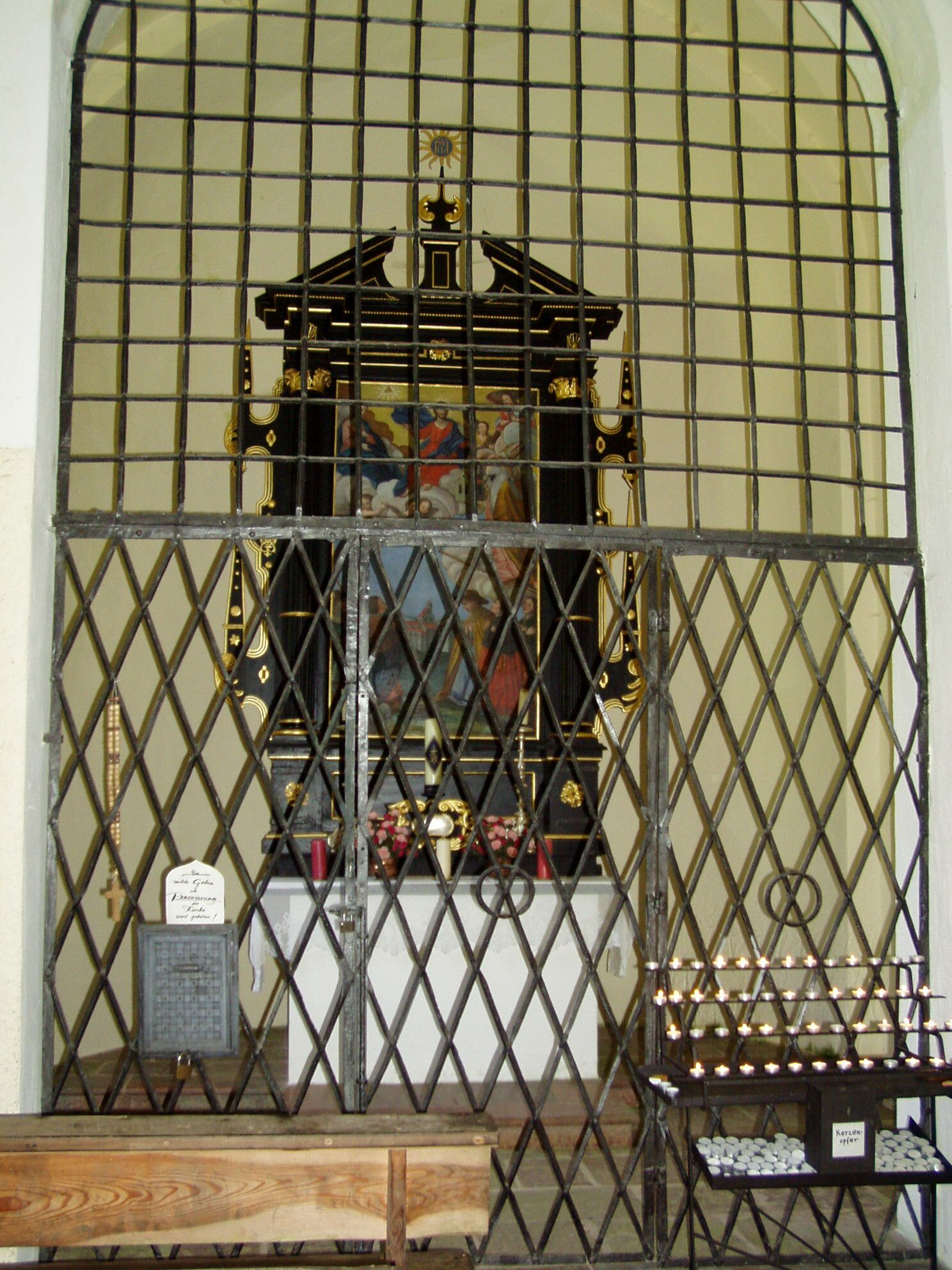 Falkensteinkirche bei St.Gilgen, Altar